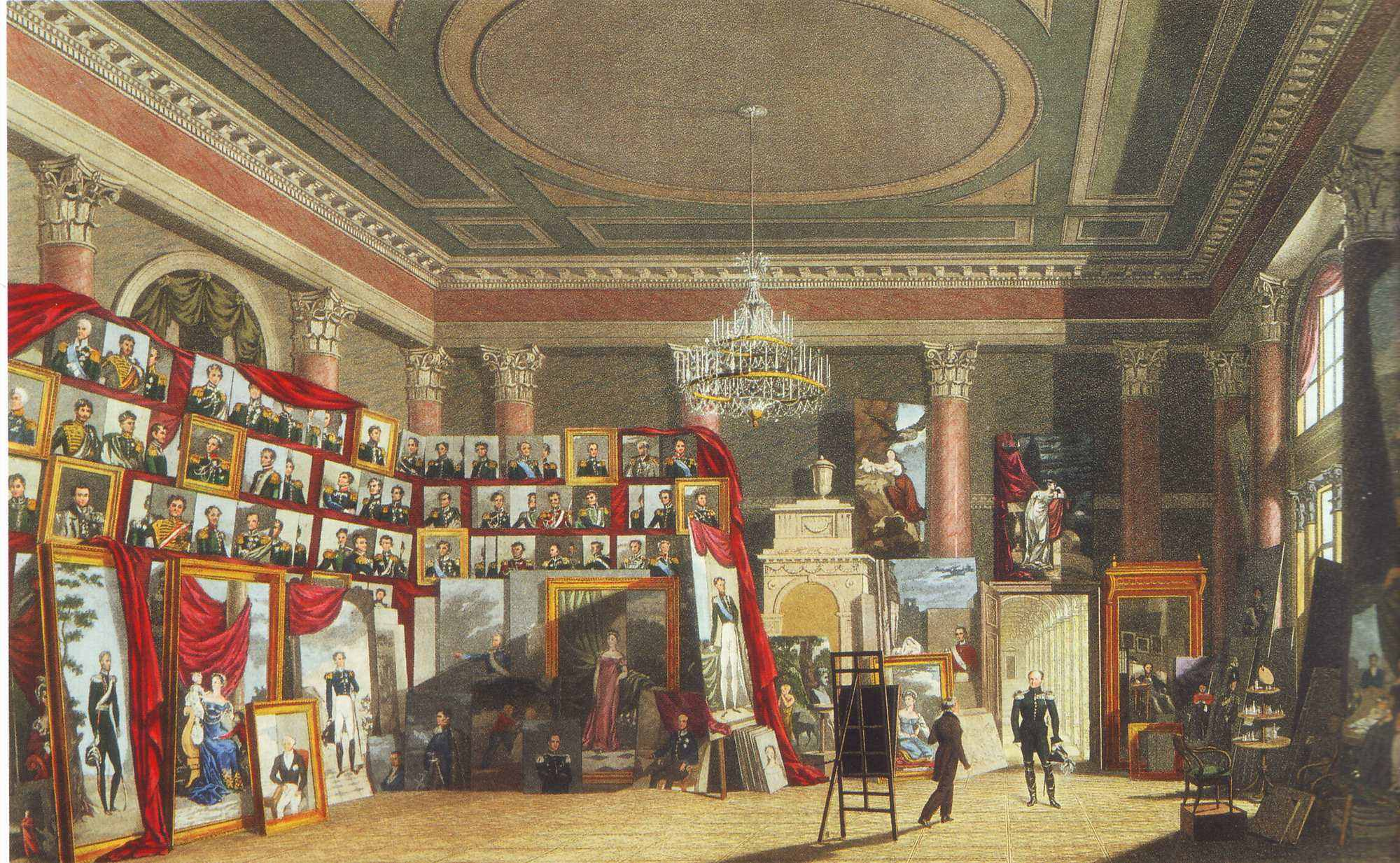 Александр I в мастерской Дж.Доу в Зимнем дворце. 1826. Беннет и Райт по оригиналу Мартынова. Эрмитаж